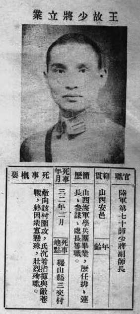 中文（台灣）: 抗戰軍人忠烈錄第一輯中的烈士遺像